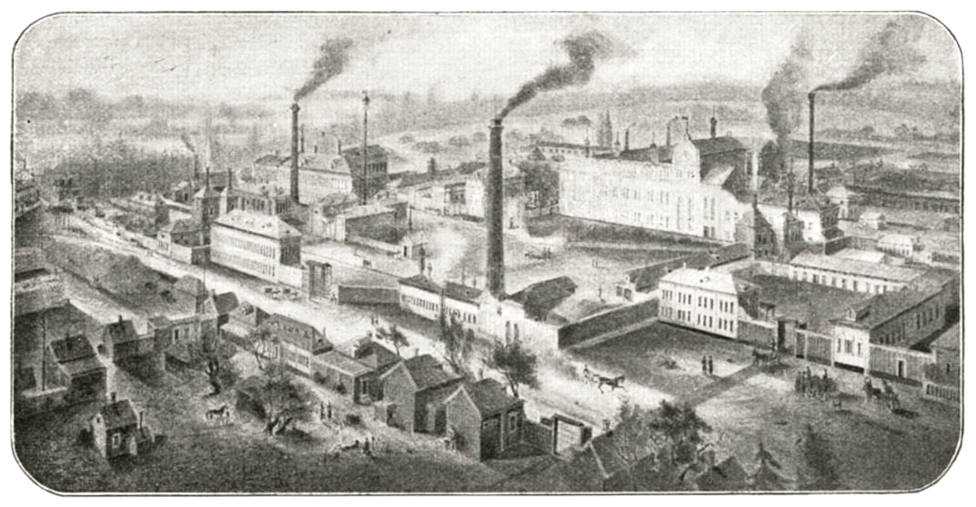 Дулевская фарфоровая фабрика периода «Товарищества производства фарфоровых и фаянсовых изделий Матвея Сидоровича Кузнецова», 1889 г.